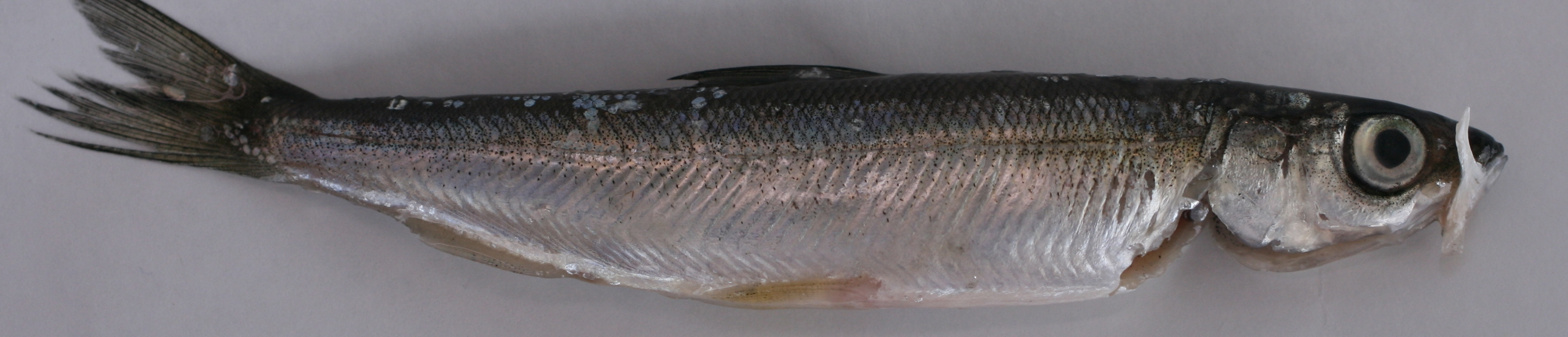 Coregonus albula ( Muikku )